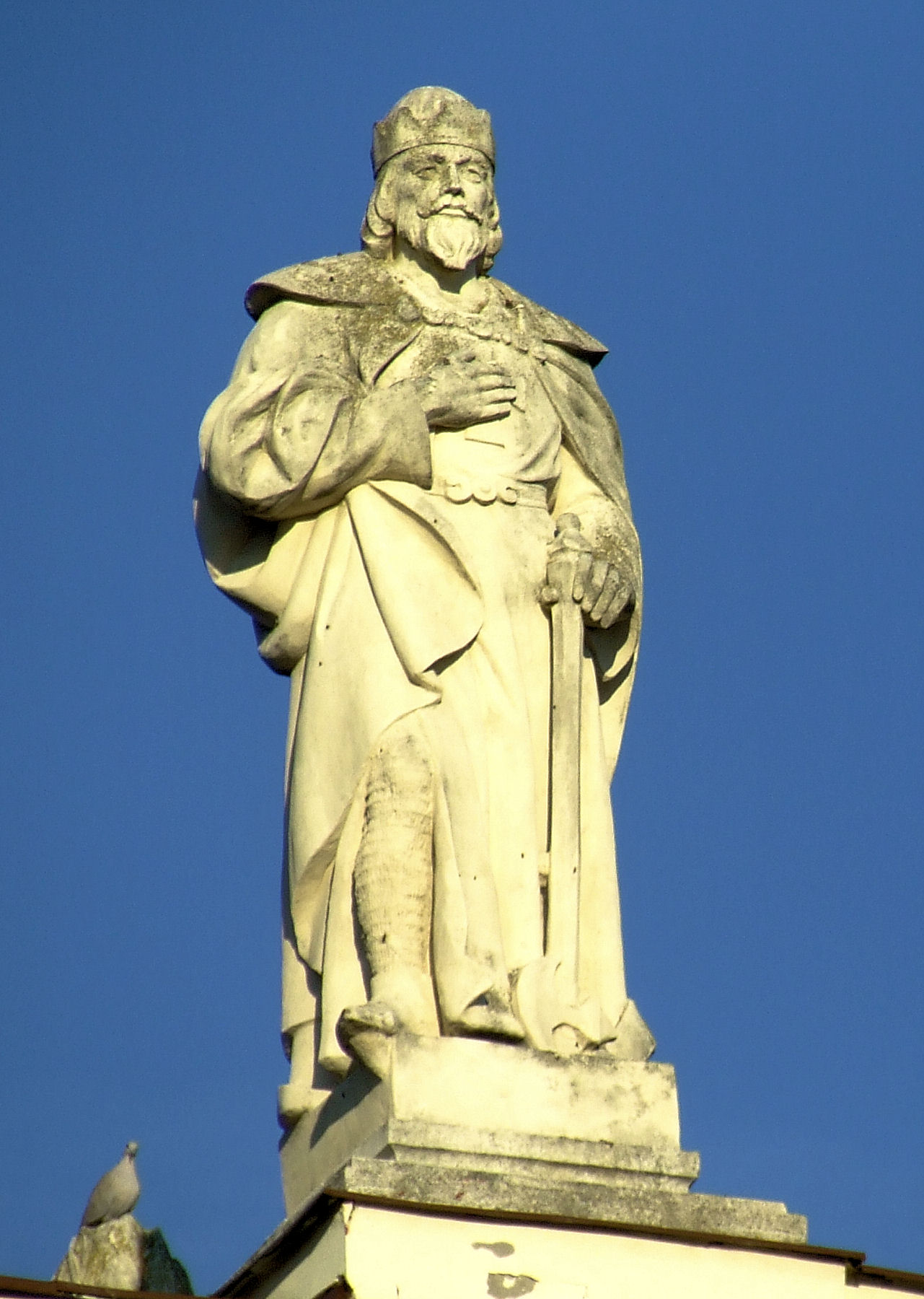 Szent László szobra a jánoshalmi Szent Anna-templomon